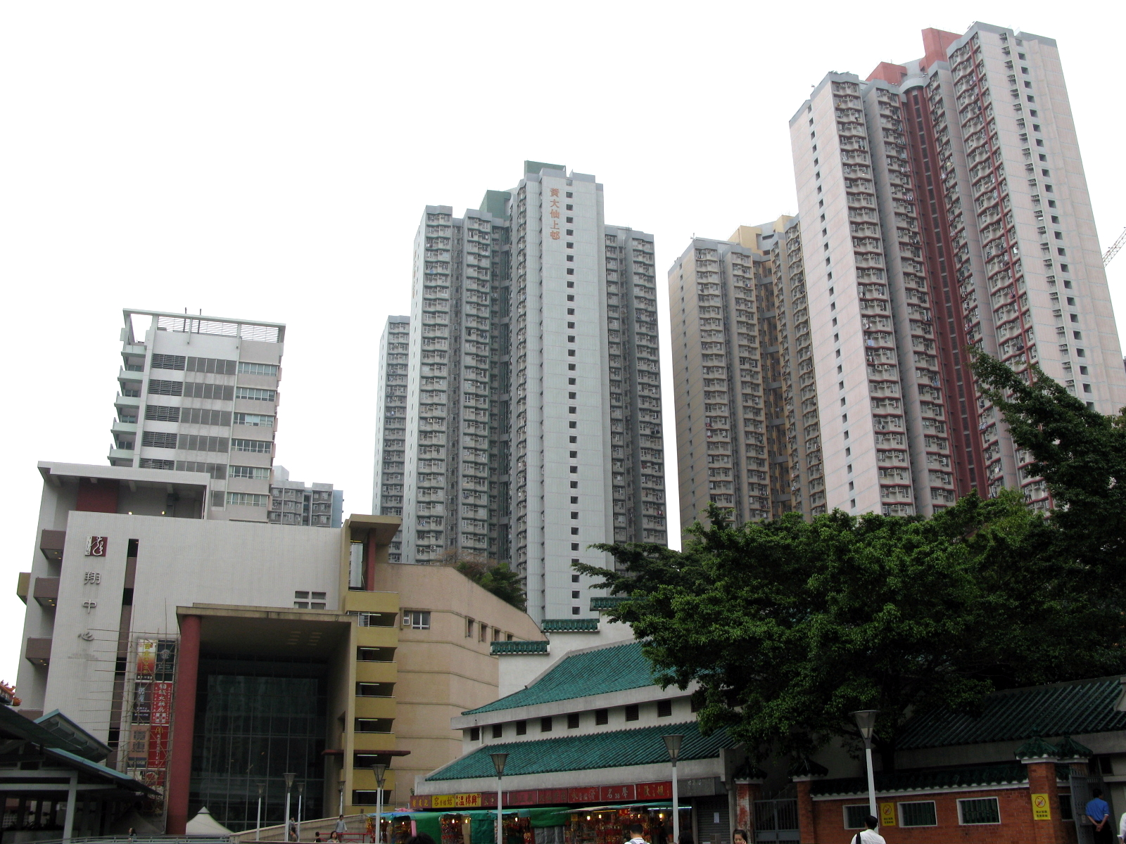 黃大仙上邨 Upper Wong Tai Sin Estate